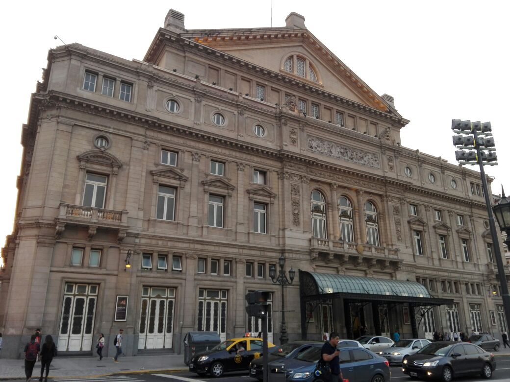 Perspectiva desde Metrobus, 9 de Julio